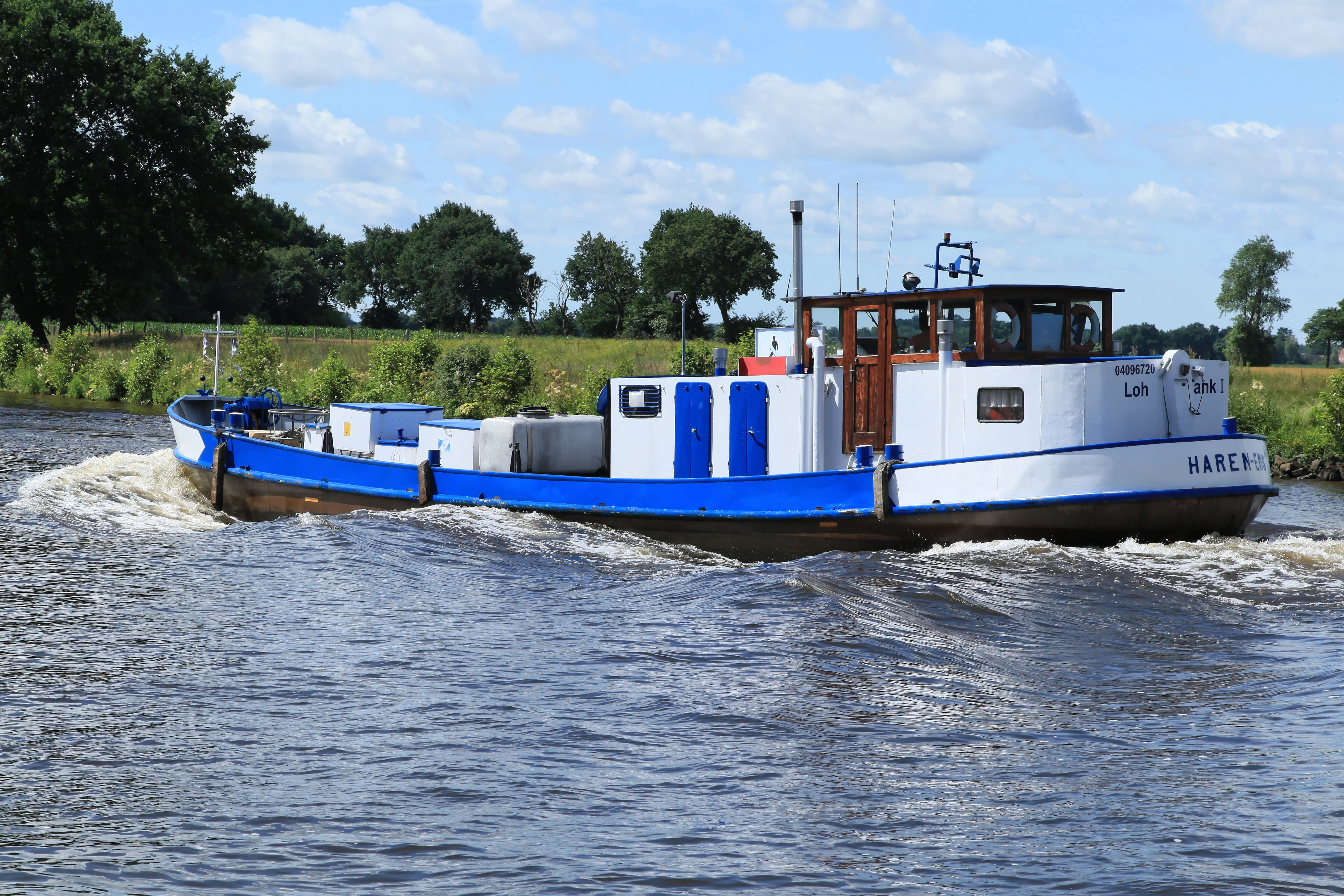 Blick von der Kirchstraße in Steinbild zur Loh-Tank I (ENI 04026790) auf der Ems zwischen Kluse (Emsland) und Walchum. Gemäß Binnenschifferforum ist die am Schiff aufgemalte ENI 0496720 falsch.